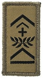 Fourier